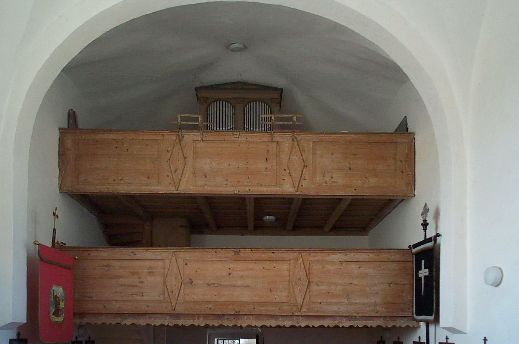 Hohenthann, Türkenfeld 25. Filialkirche St. Ägidius. Ehemalige Schlosskapelle. Kleiner ungegliederter Saalbau mit eingezogener Chorapsis und Dachreiter. Romanischer Bau des 12./13. Jahrhunderts, teilweise barock verändert. Zweigeschossige Westempore mit Orgel.